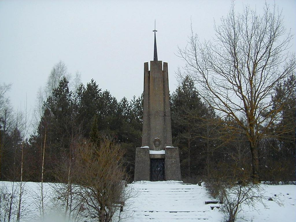 Nāvessalas piemineklis. 2003-03-09. Pieminekļa autori: Eižens Laube (1880-1967), Arthurs Galindoms (1984-1966).